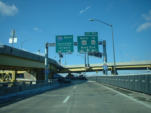 Interstate 376 - Pennsylvania